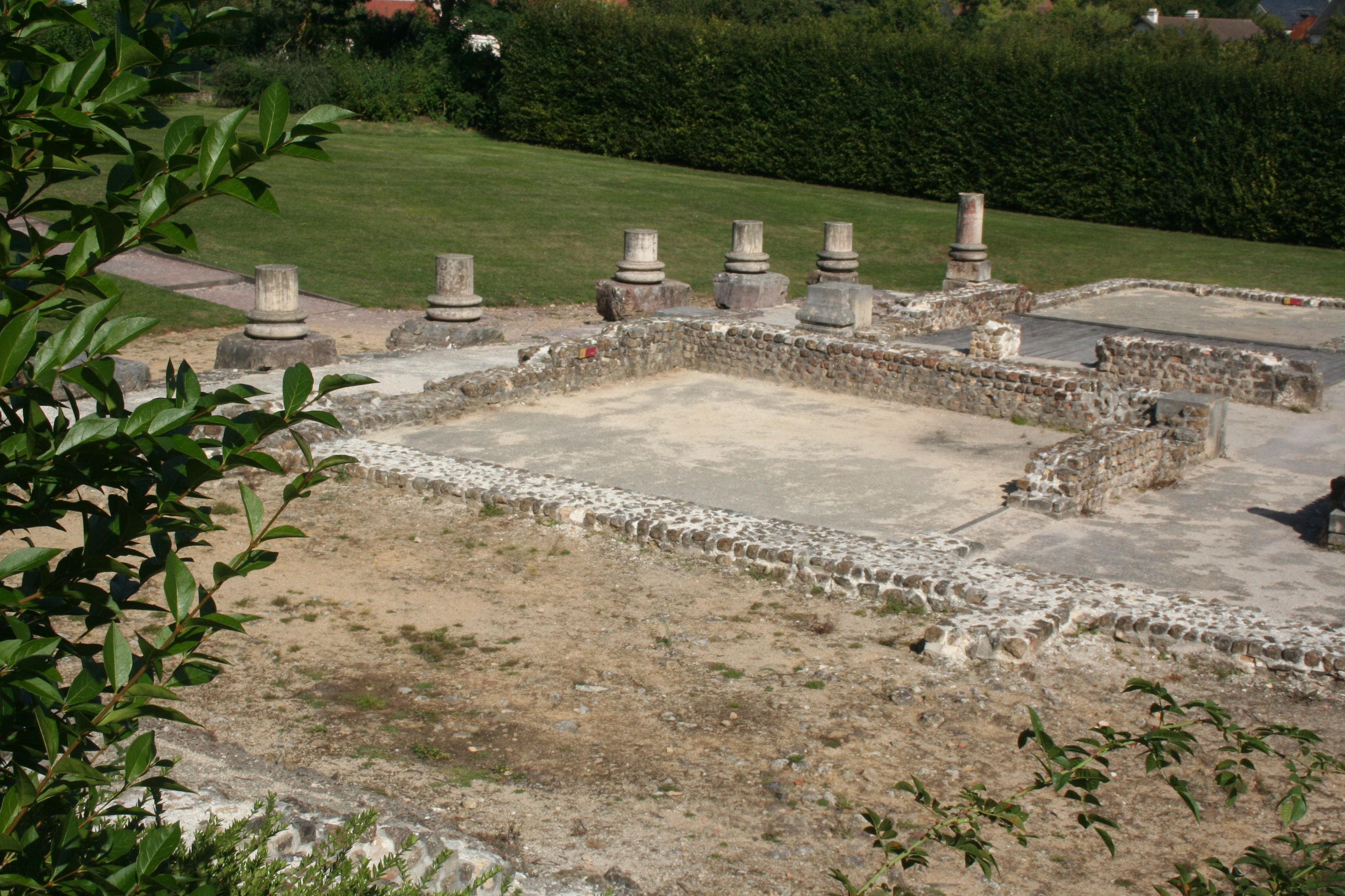 vue de la villa au grand péristyle de Vieux, vers la colonnade de la façade